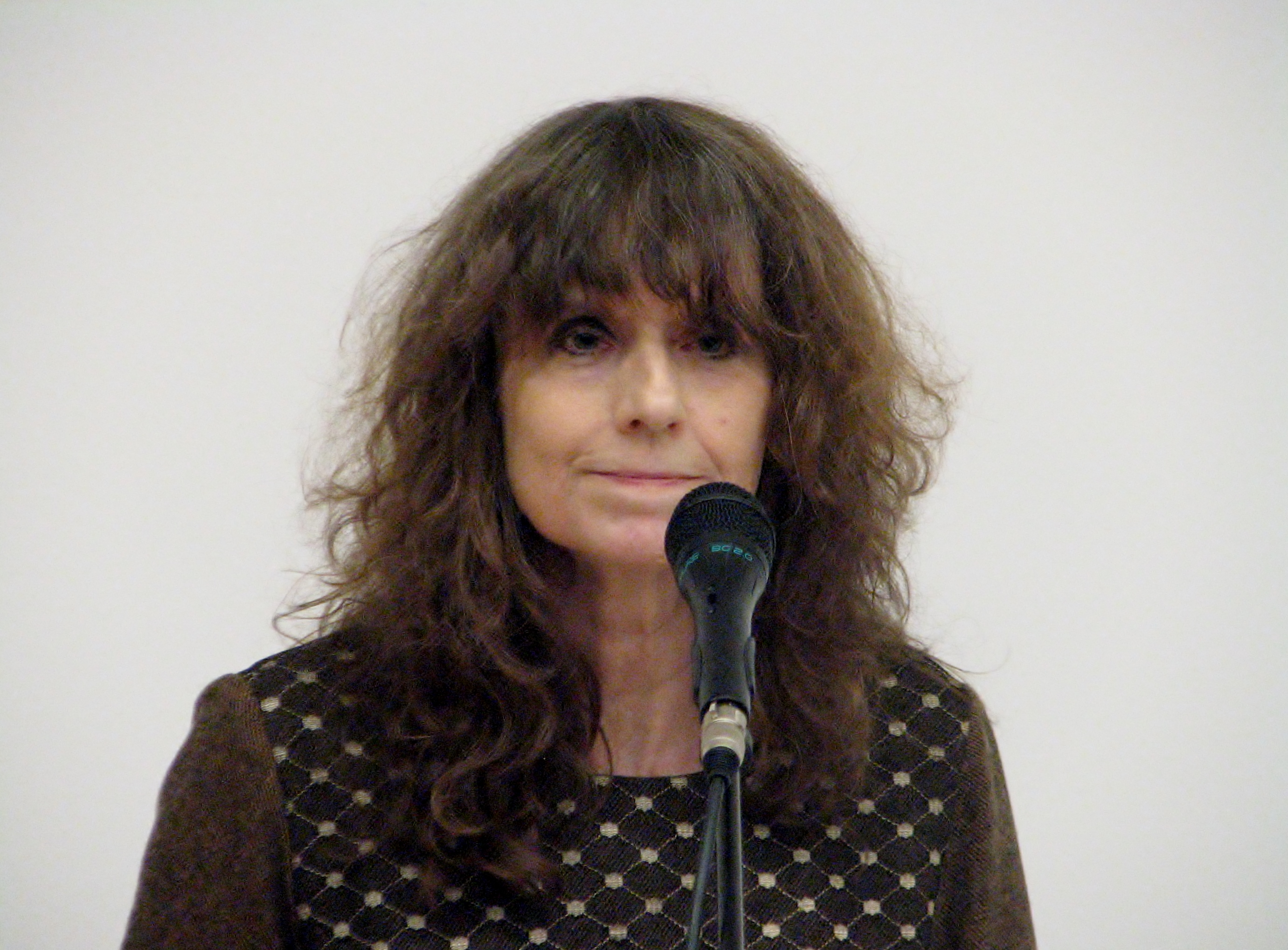 Tiina Kirss esinemas Tallinna Ülikoolis toimunud konverentsil "Eesti humanitaarne tulevik"